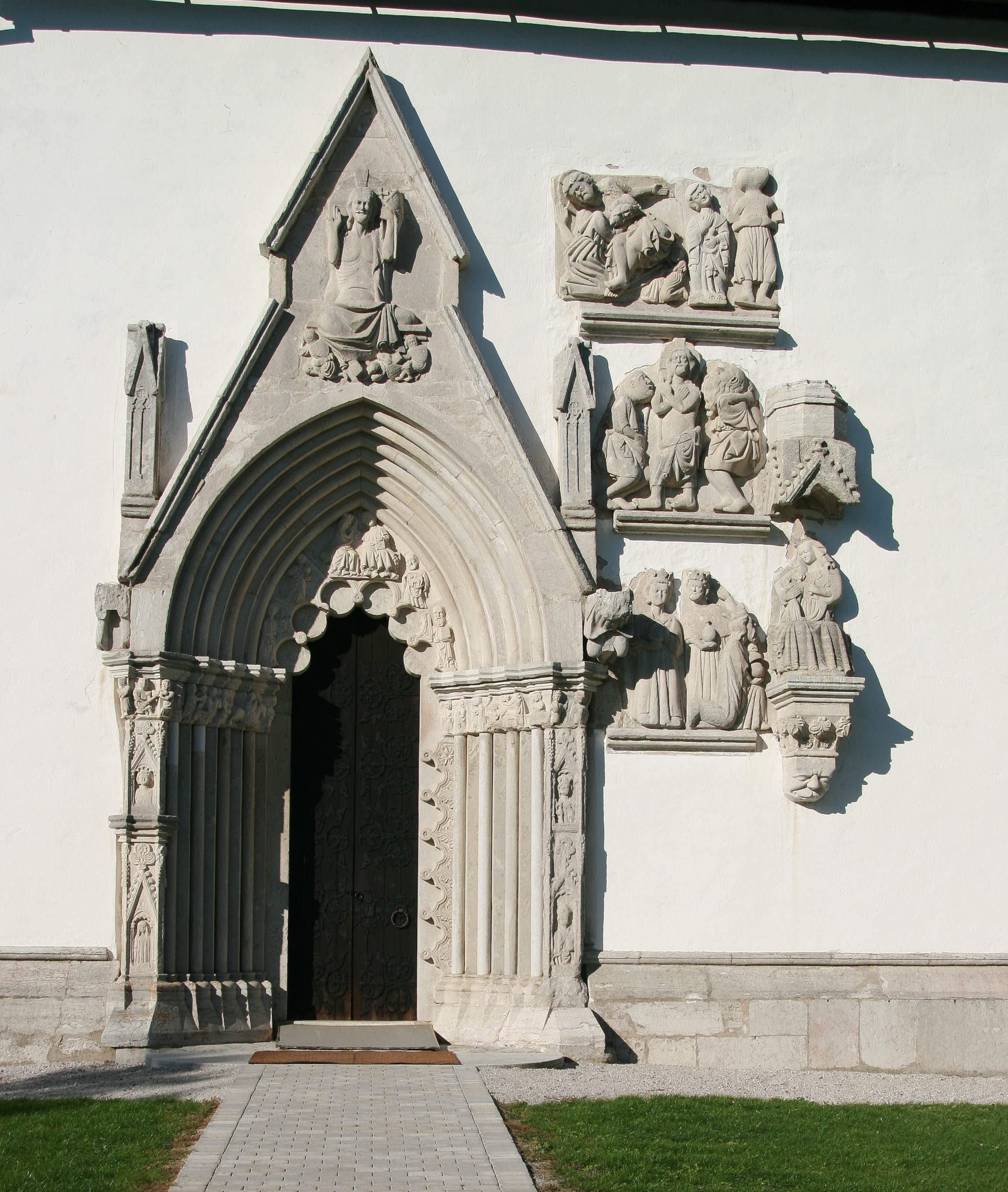 Portalen med skulpturer av Egypticus